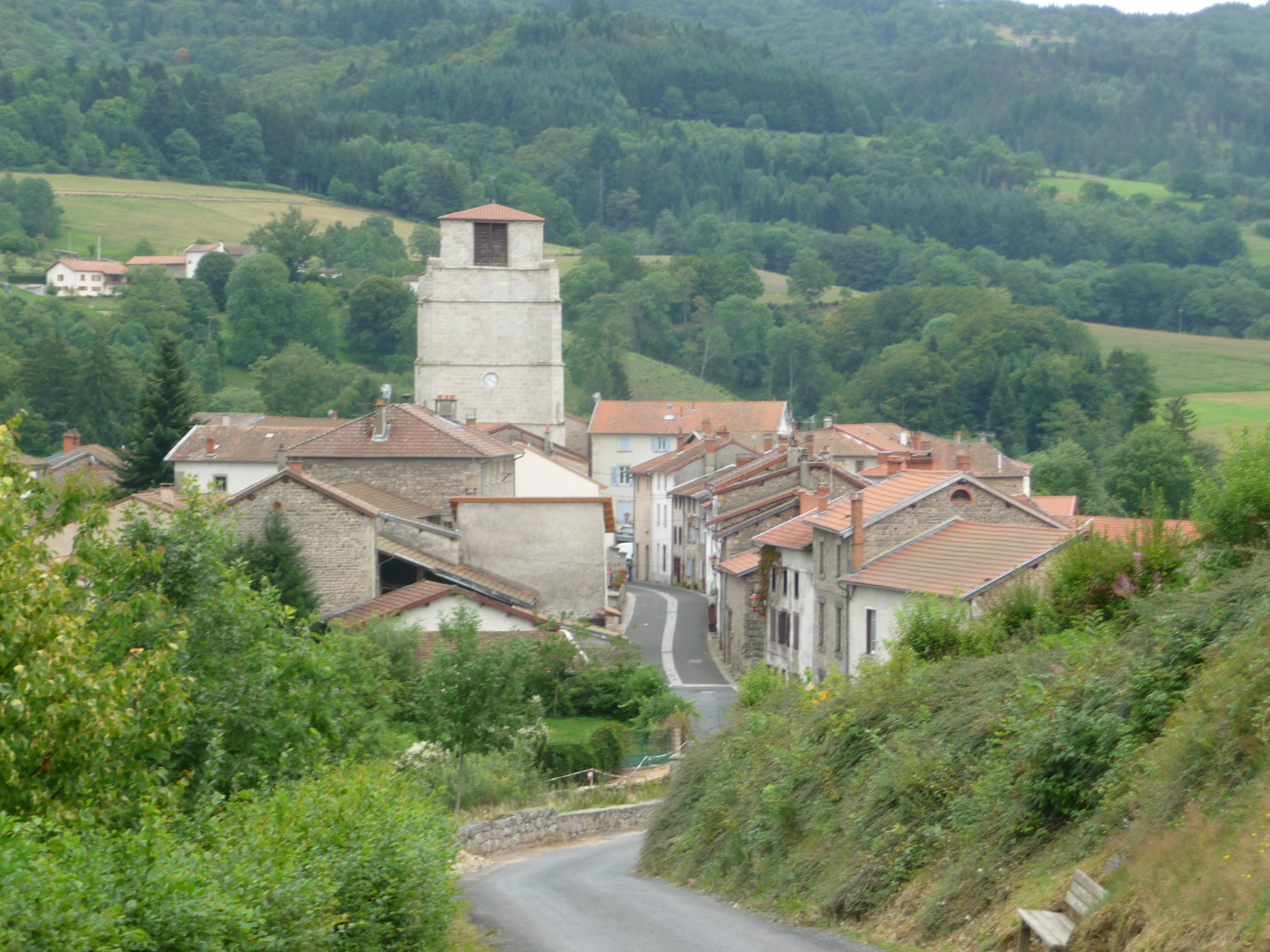 Vue du village de Job.